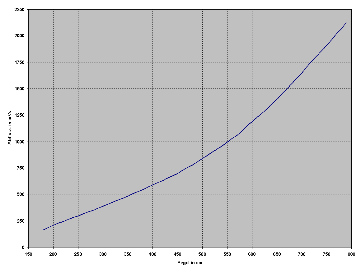 Pegel Würzburg, flowingturn